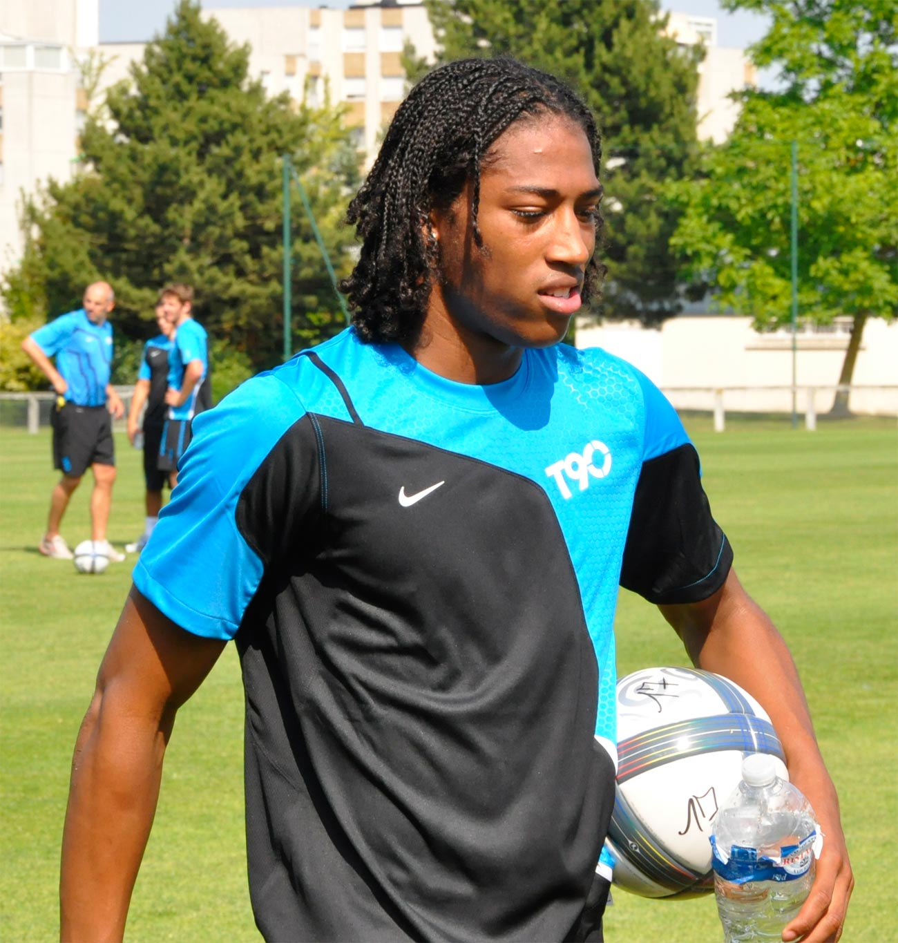 Rajiv Van la Parra à l'entrainement